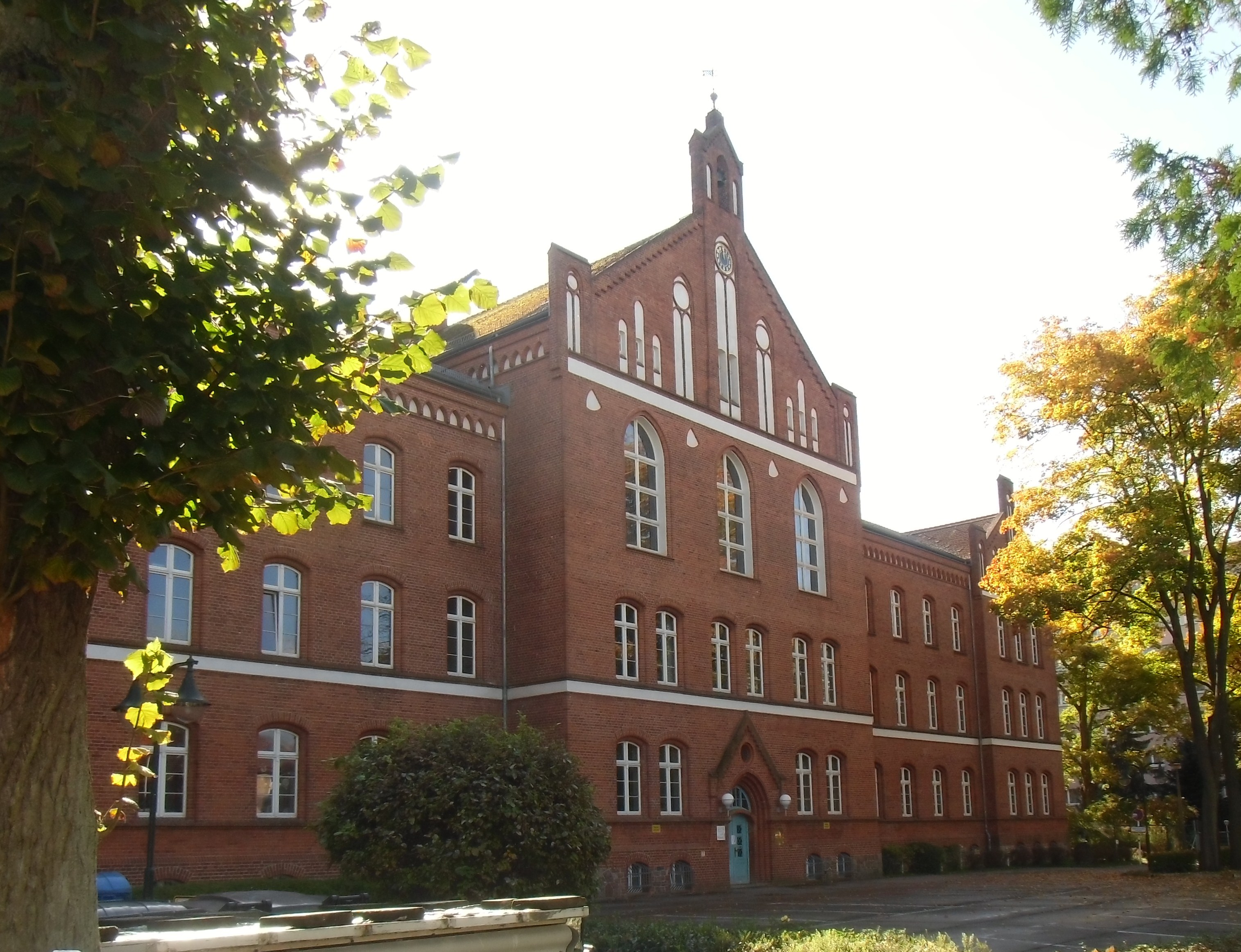 Denkmalgeschütztes Gebäude der ehemaligen Brandenburgischen Landes- und Erziehungsanstalten in Wriezener Straße 28-30, Nr. 48 in der Liste der Baudenkmale in Strausberg